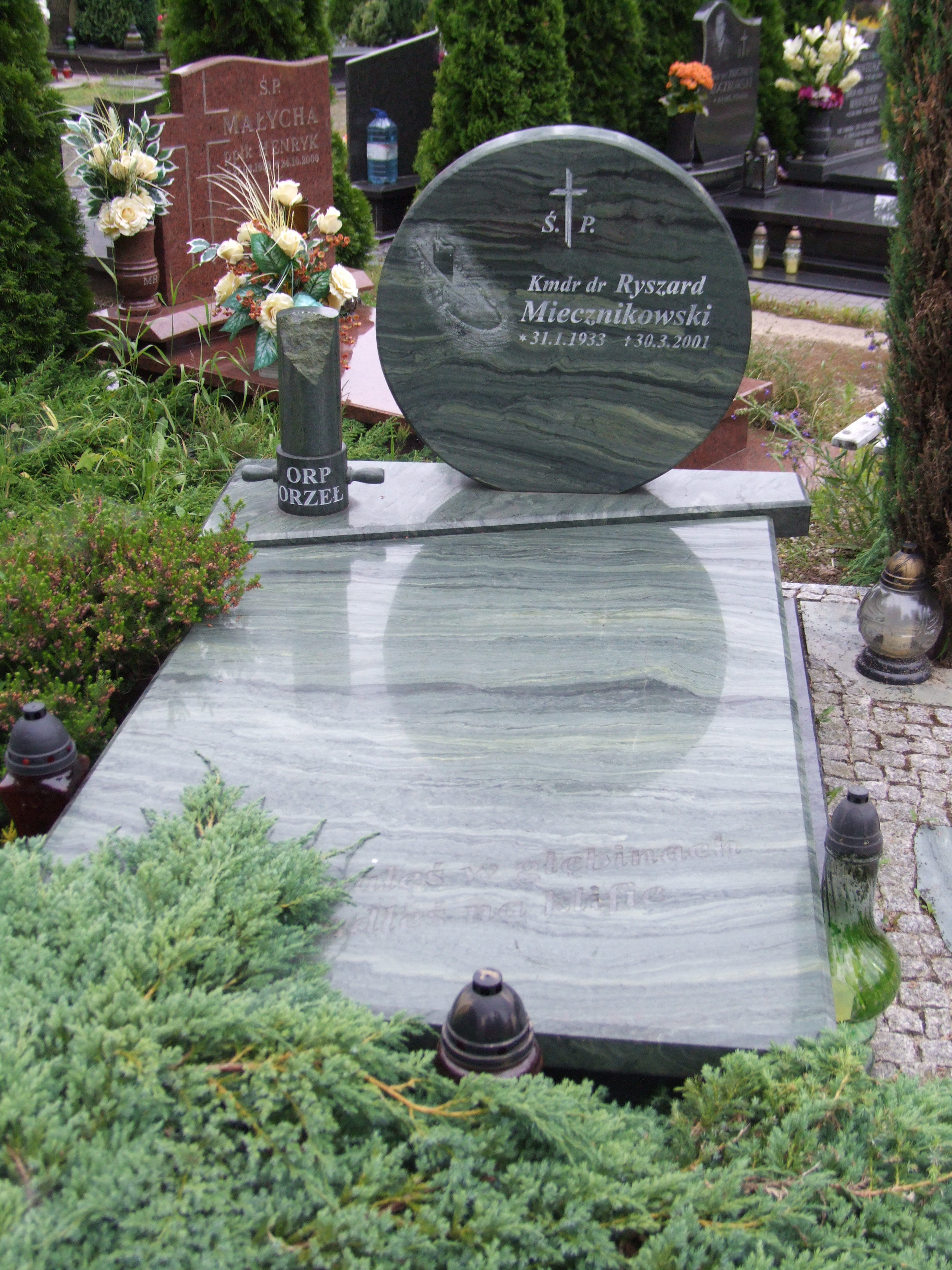 Gdynia-Oksywie Cmentarz Marynarki Wojennej